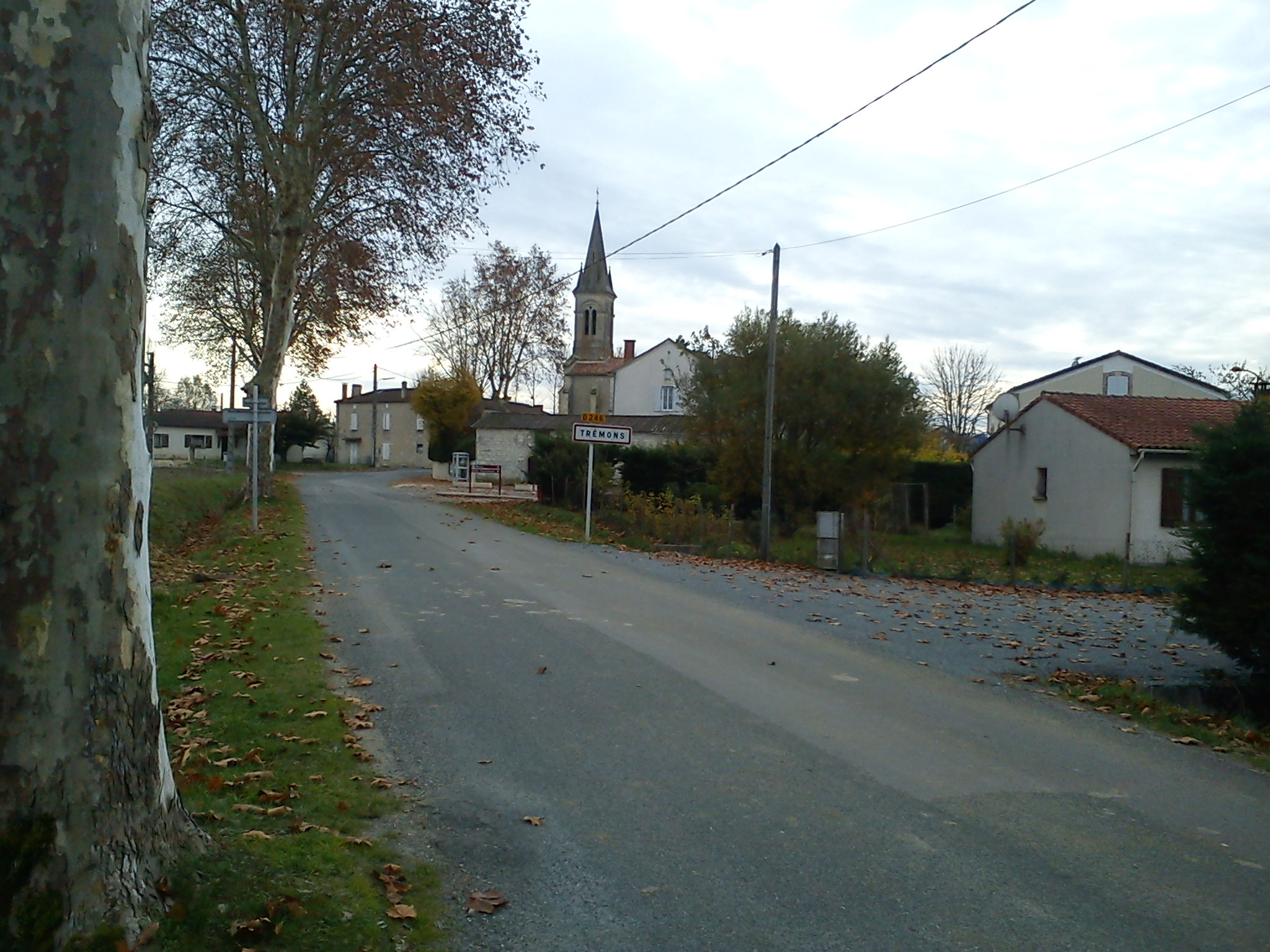 Trémons